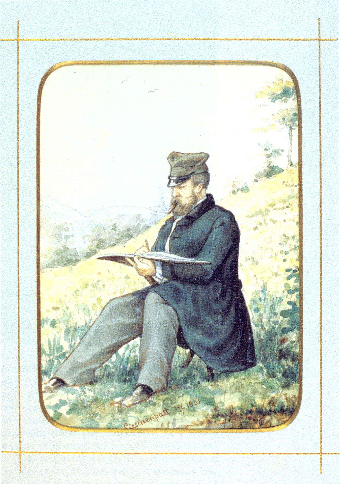 Selbstbildnis des lippischen Malers Ludwig Menke mit der Beschriftung Cieschenpatt 20/7 1851